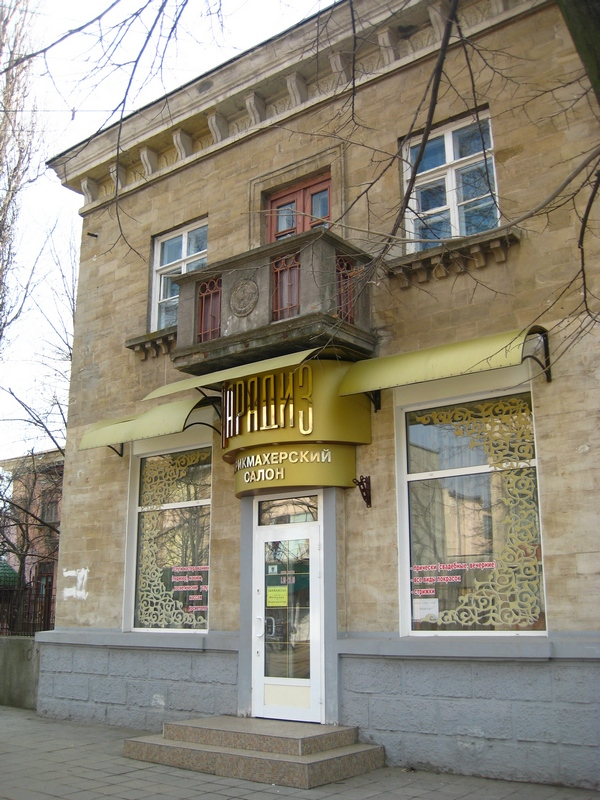 На этом месте находилась аптека Давида Свердлика